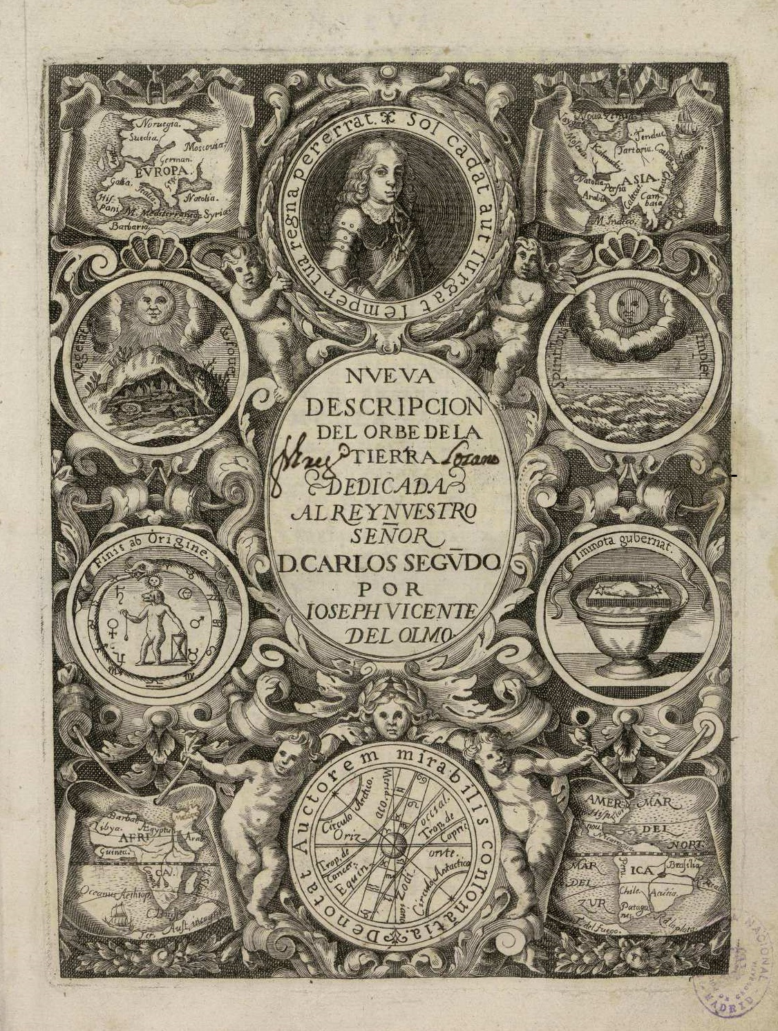 Frontis de "Nueva descripcion del orbe de la tierra: en que se trata de todas sus partes interiores, y exteriores, ... y... uso y fabrica de los mapas, y tablas geographicas...: explicanse sus diferencias, se corrigen los errores... de las antiguas...: tocanse... curiosidades de philosophia natural, y de historia sagrada, y profana... por Ioseph Vicente del Olmo... en Valencia por Ioan Lorenzo Cabrera, 1681